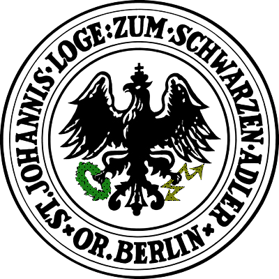 Siegel der JL Zum schwarzen Adler, Berlin